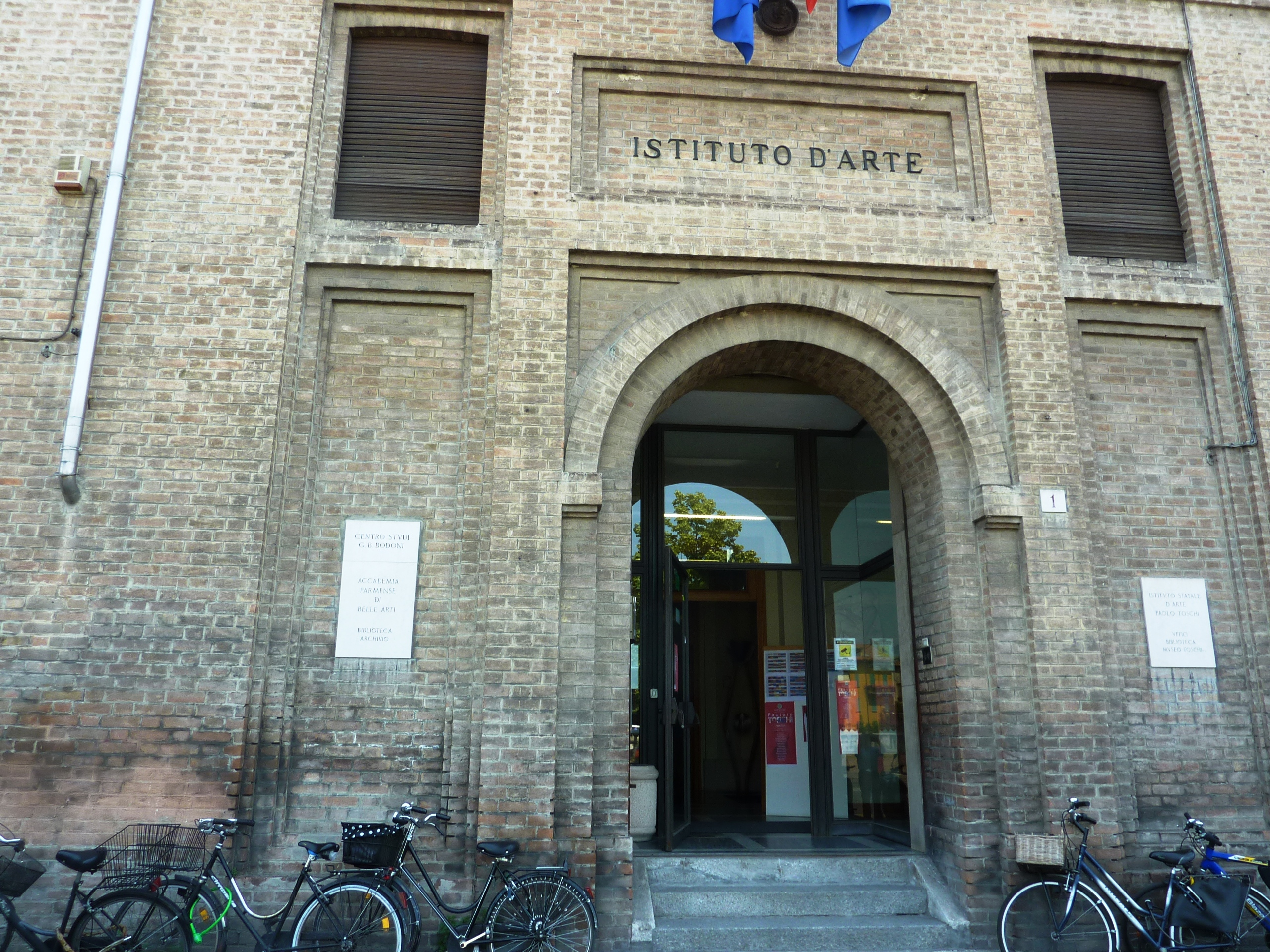 L'ingresso dell'Istituto d'Arte Paolo Toschi di Parma.